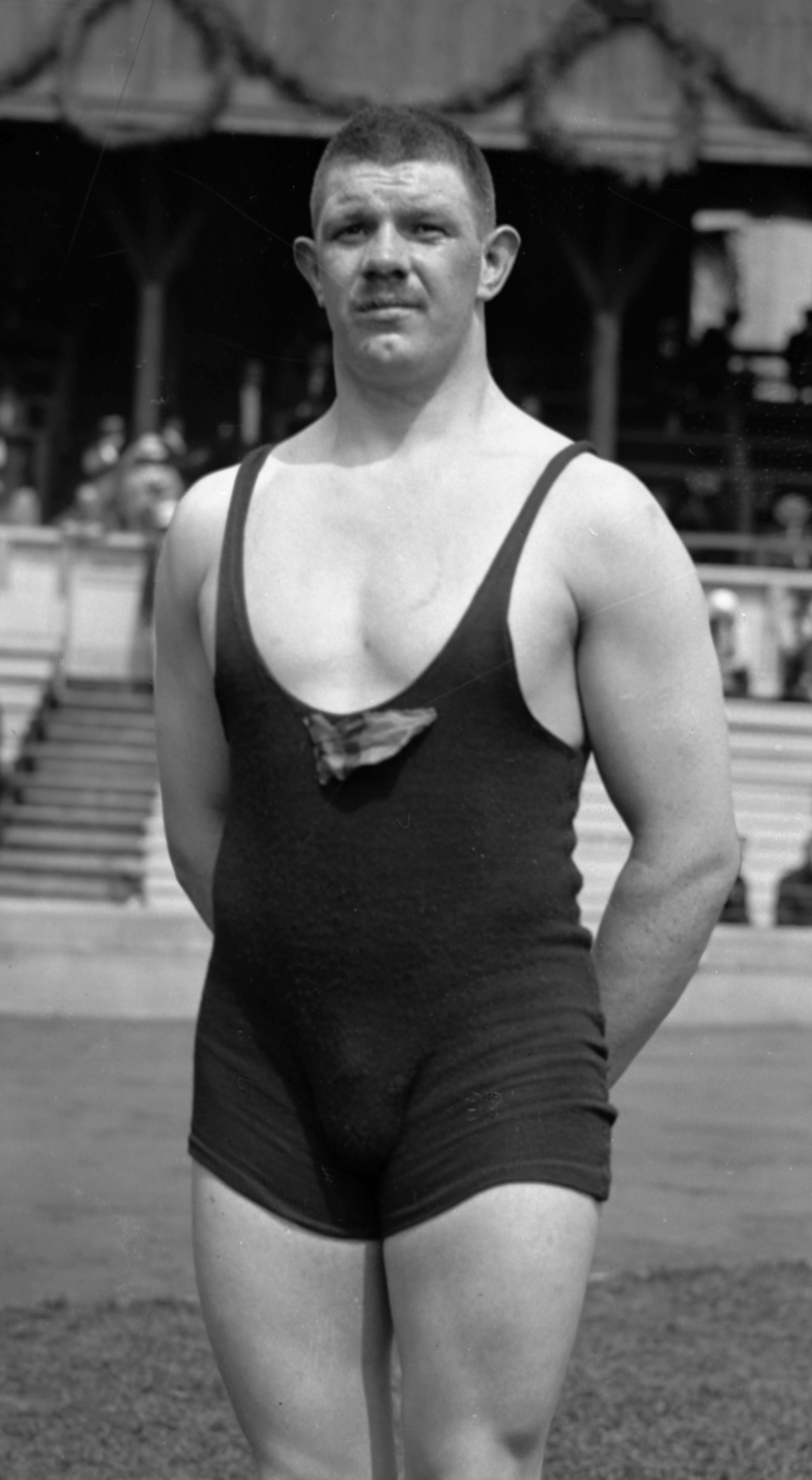 Olympiska spelen i Stockholm 1912. A.O. Ahlgren som i mellanvikt B brottades oavgjort i nio timmar mot J. Böling, Finland. Båda fick en 2:a placering.